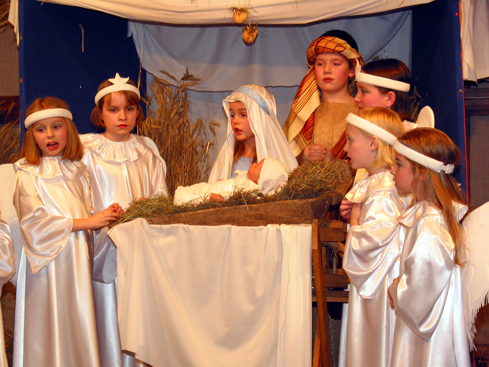 Scena z jasełek w wyk. amatorskiego Teatru Raj. fot. Tomasz Goździewicz 2003 r.